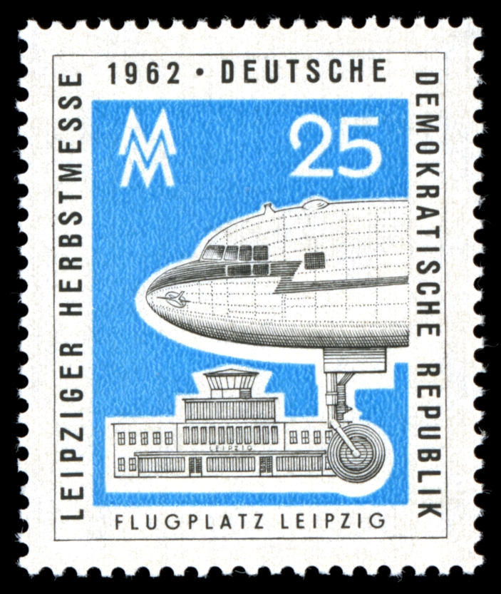 Information: Ausgabepreis: Pfennig First Day of Issue / Erstausgabetag: Auflage: Entwurf: Druckverfahren: Michel-Katalog-Nr: Ländercode-MiNr